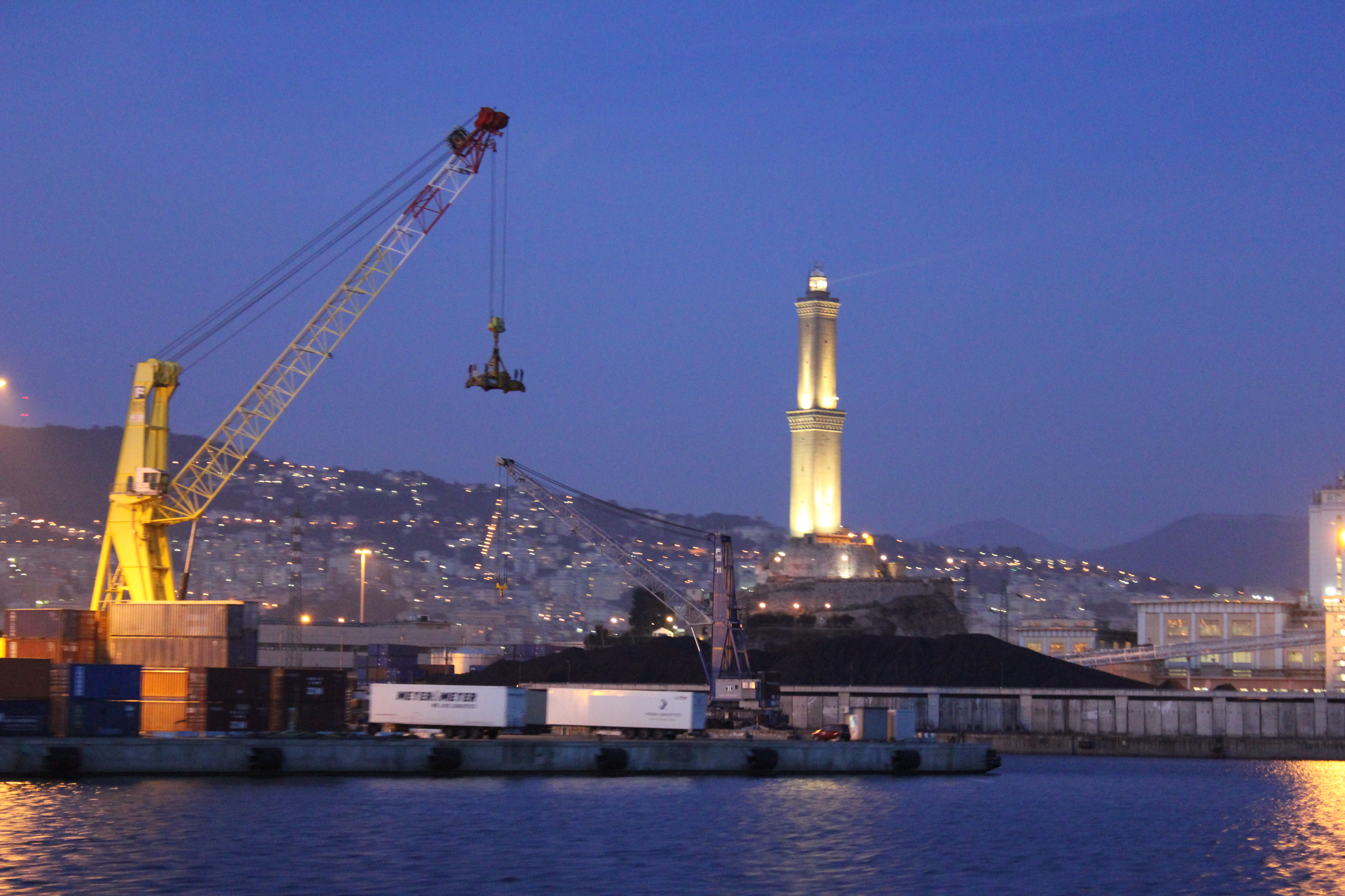 Lanterna al tramonto